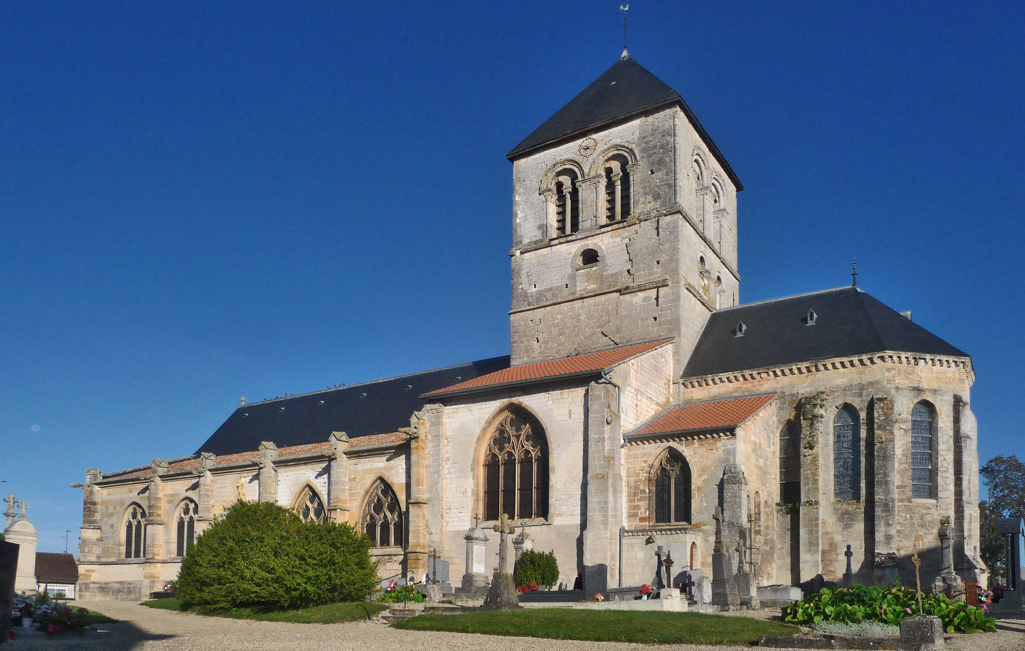 L'église Saint-Martin est mentionnée pour la première fois dans le polyptyque de l'abbaye de Saint-Remi de Reims, au IXe siècle. Cet ancien édifice a aujourd'hui disparu. L'église actuelle, classée, possède une nef romane charpentée de la première moitié du XIIe siècle, dont les murs sont percés de fenêtre en plein cintre. Elle fut reprise au XVIe siècle et dotée de chapiteaux historiés soigneusement sculptés (chimères, centaures, anges, sirènes, un homme et une femme les bras enlacés, des hommes caressant le visage d'une jeune fille, un femme ayant un homme sur les épaules et lui tenant les jambes; un ange tenant un écusson portant le mononogramme du Christ IHS etc…). De même, le transept du XIIe siècle fut remanié en 1520 par Guichard Antoine, comme l'atteste l'inscription "LAN MILLE V C ET XX GUICHARD ATOIE ICI ME MIST". Il porte une belle tour carrée romane à ouvertures géminées en plein cintre. Le chœur gothique à abside polygonale, avec deux chapelles rectangulaires, était achevé vers 1200. Les collatéraux ne sont pas contemporains : celui du sud est flamboyant ; celui du nord, de style Renaissance et achevé en 1555, fut construit par deux maîtres-maçons (Pierre Bernard et Arthur Clavyer), trois tailleurs de pierre ( Jean Laurent, Nicolas Legendre et Jean Rossy), tous les cinq de Châlons, et un certain Pierre Laurent dit Gobillart, de l'Epine, dont le métier n'est pas précisé. La façade est percée, comme la nef, de trois portails d'époque différente. .